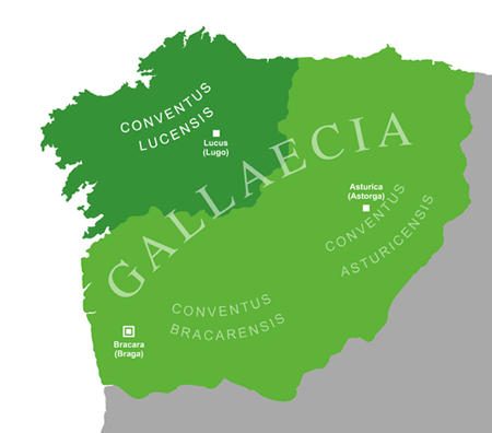 Mapa xeográfico-administrativo da Gallaecia no século III d.C, onde se destaca o Conventus lucensis.